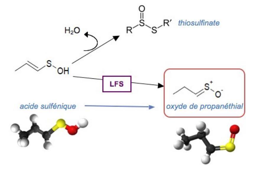 Réaction 2